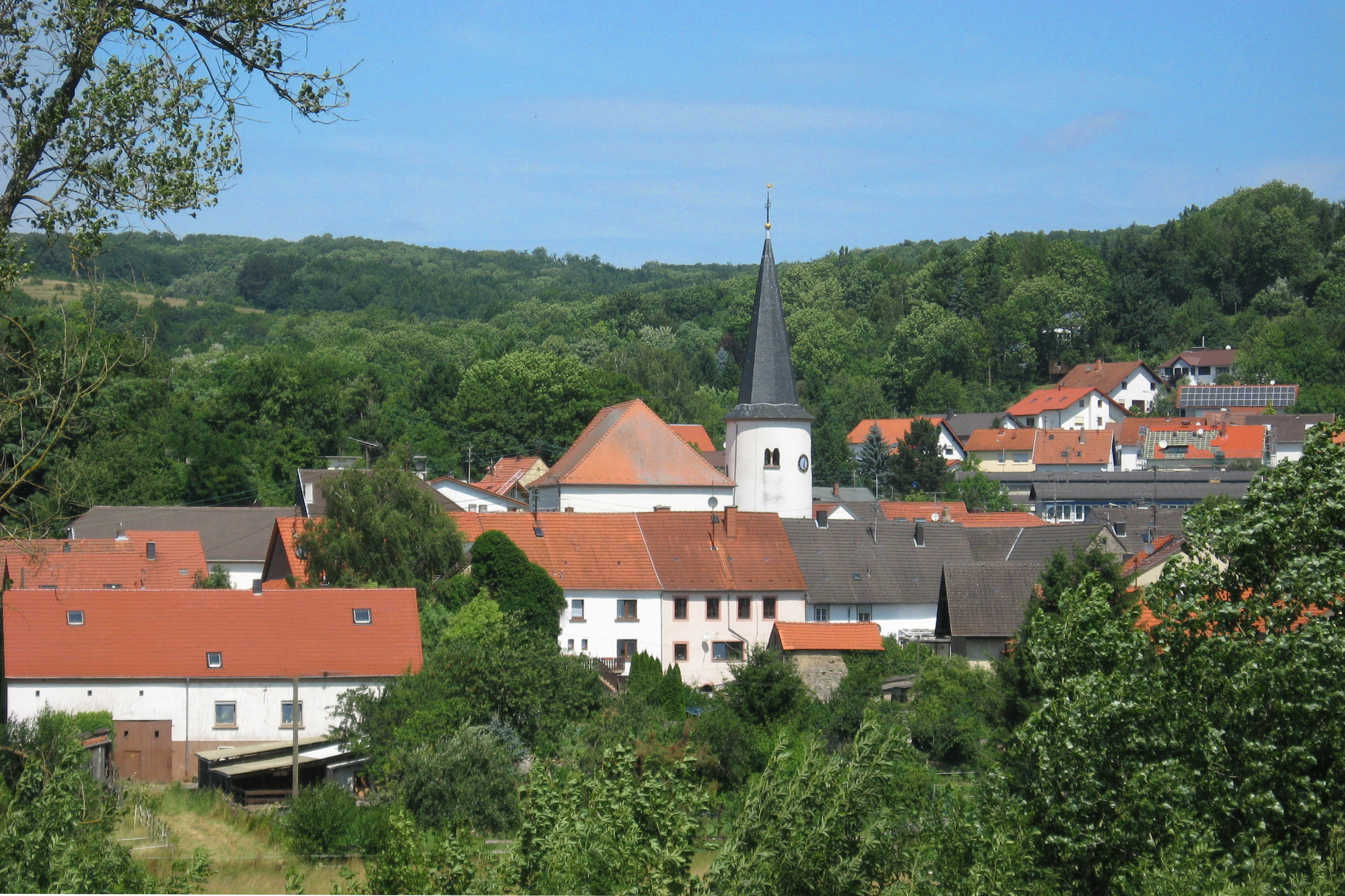 Blick auf Reinheim vom Fürstengrab